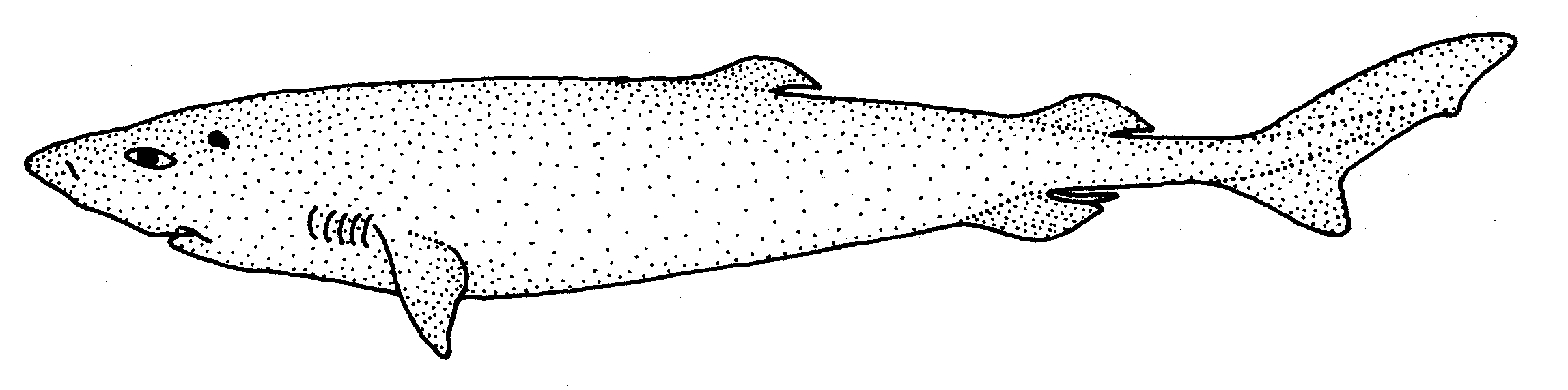 Scymnodalatias sherwoodi (Sherwood dogfish)